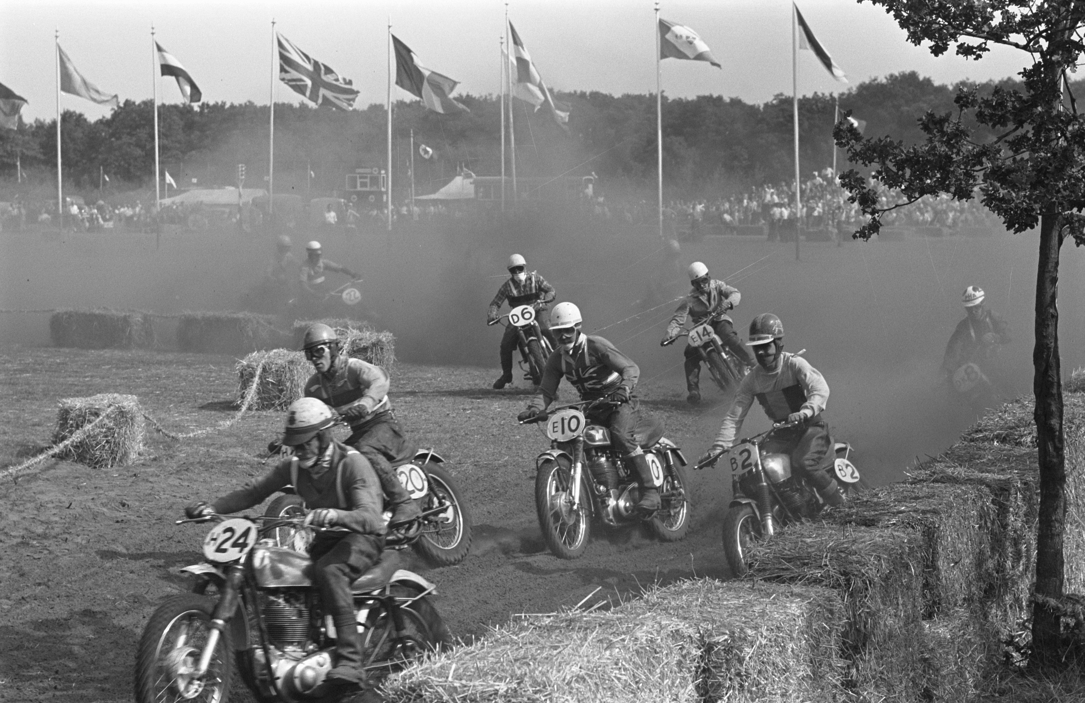 Collectie / Archief : Fotocollectie Anefo Reportage / Serie : [ onbekend ] Beschrijving : Internationale motorcross te Norg Datum : 26 juli 1959 Fotograaf : Pot, Harry / Anefo Auteursrechthebbende : Nationaal Archief Materiaalsoort : Negatief (zwart/wit) Nummer archiefinventaris : bekijk toegang 2.24.01.05 Bestanddeelnummer : 910-5507